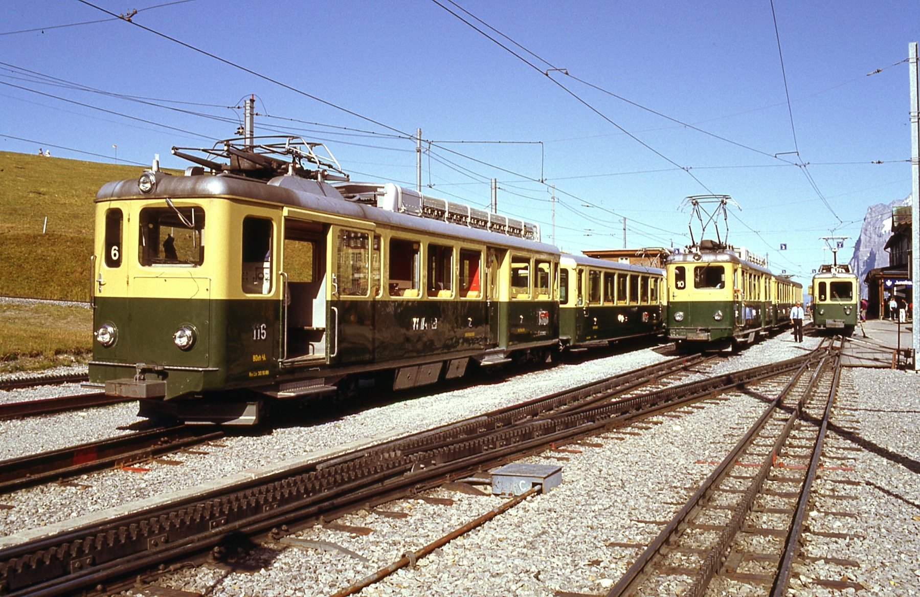 Photo. Trams aux Fils. Ligne de 19,1 Km à crémaillère et à voie de 0.80cm, (Plus longue ligne à crémaillère d'Europe) partant de Lauterbrunnen - Wengen - Kleine Scheidegg - Grindelwald, ouverte en 1893 avec des trains vapeur, puis dès 1902 à l'électricité et vapeur jusqu'en 1912. Photo prise dans les années 1980